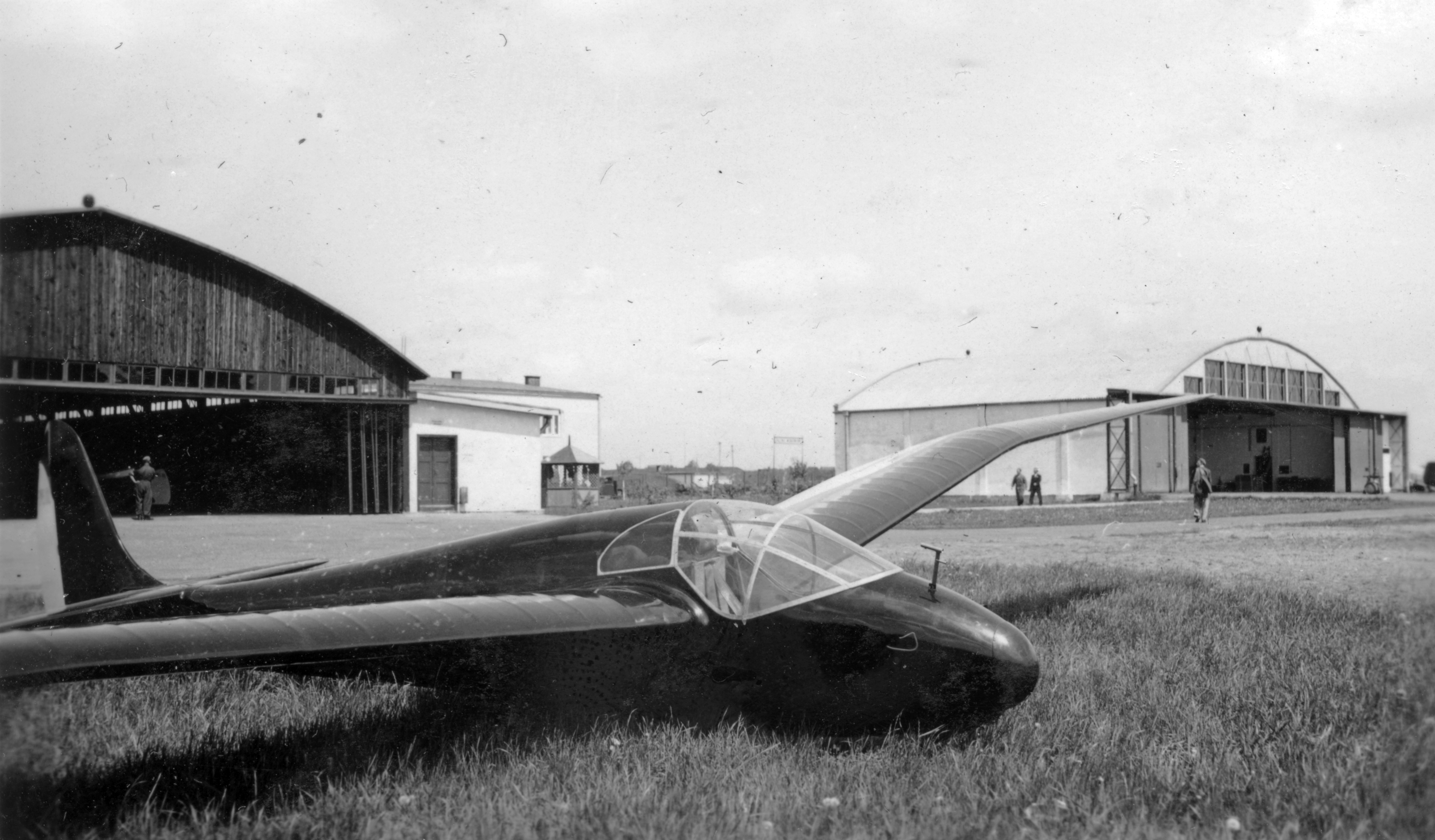 PWS-101 típusú vitorlázó repülőgép. Location: Poland Tags: sailplane, airport, hangar, airplane, PWS-brand Title: PWS-101 típusú vitorlázó repülőgép.